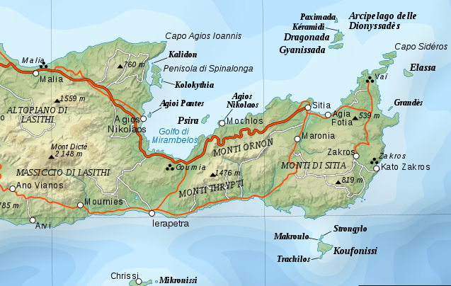 Mappa di Lassithi (Creta orientale) in Italiano